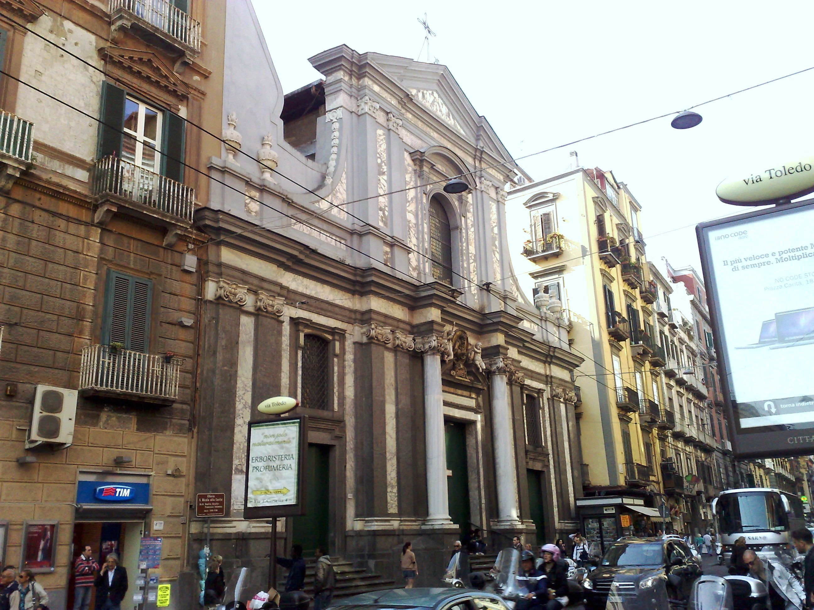 San Nicola Alla Carità (Napoli)